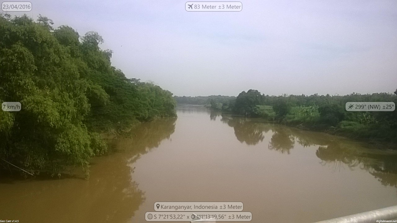 Bengawan Solo dari Jembatan Payak